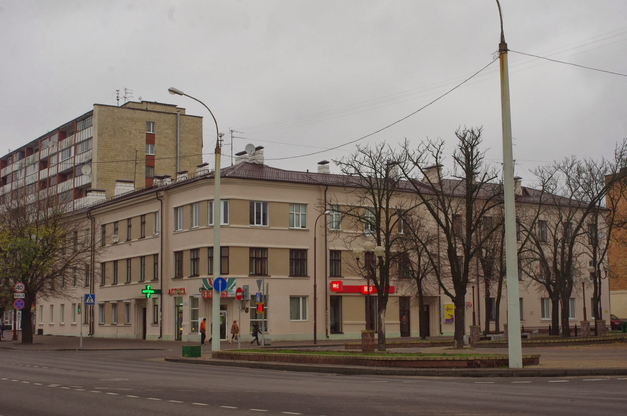 Lieninski rajon, Brest, Belarus